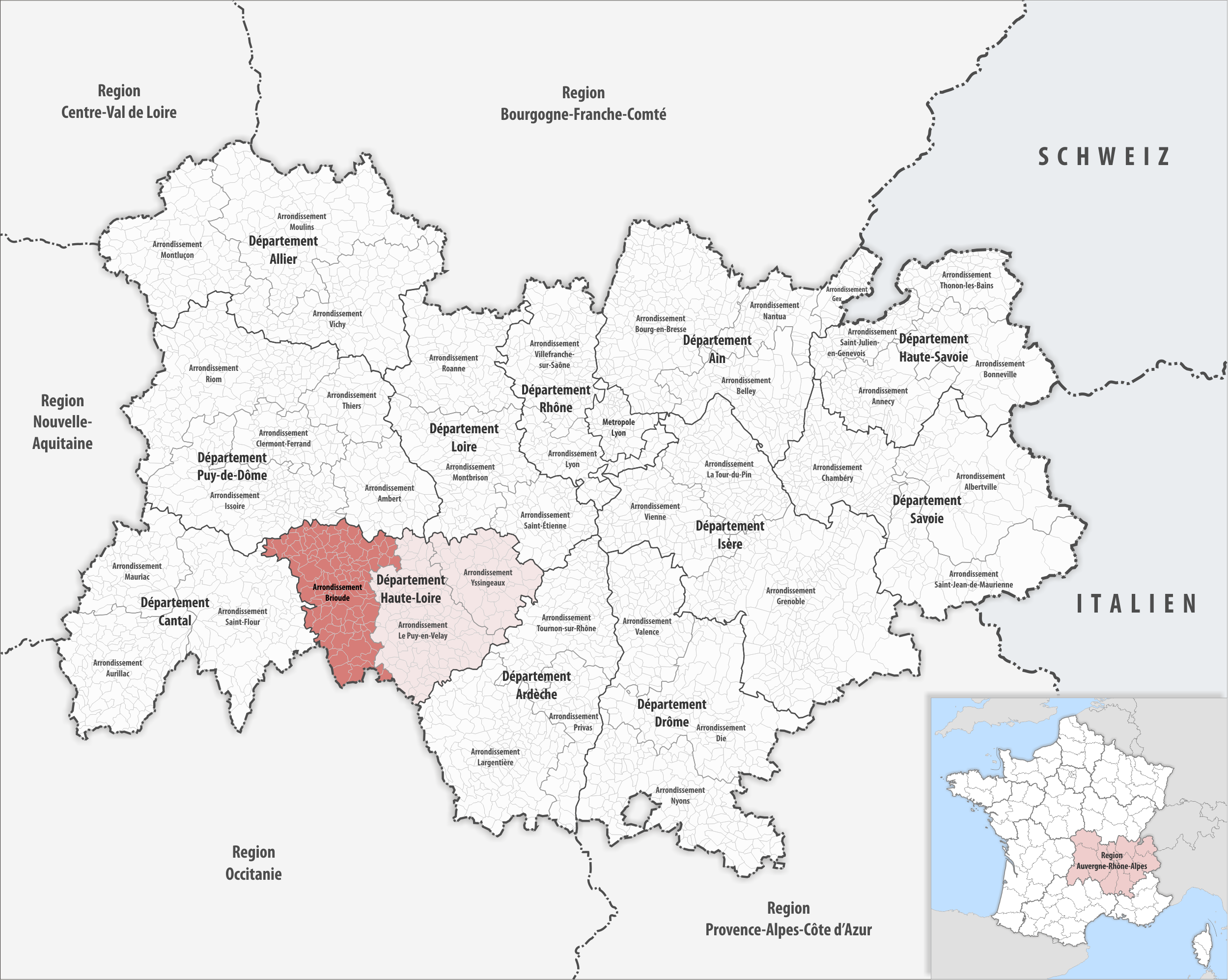 Lage des Arrondissements Brioude